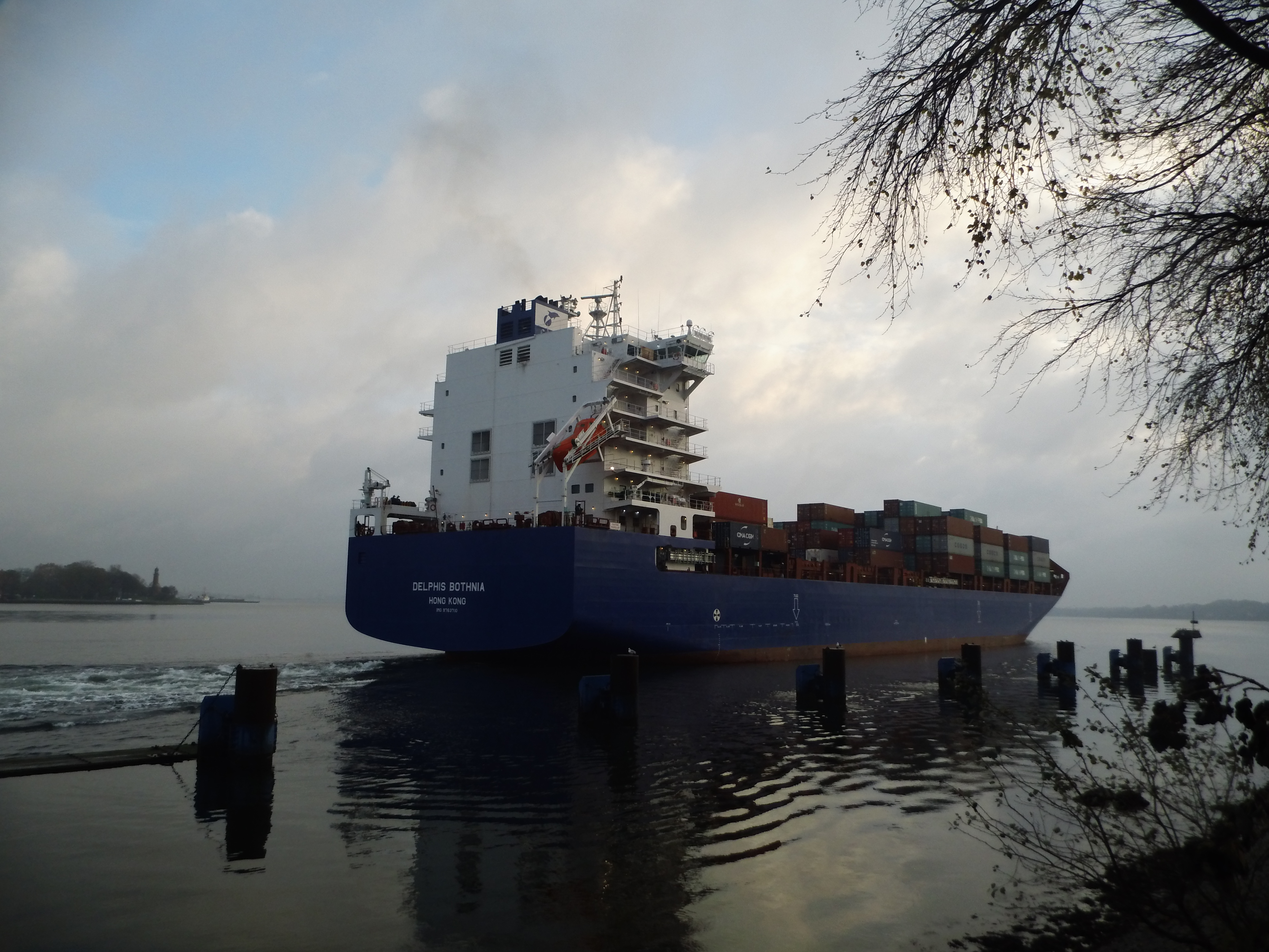 Container ship Delphis Bothnia in Kiel Canal; lock Kiel Holtenau